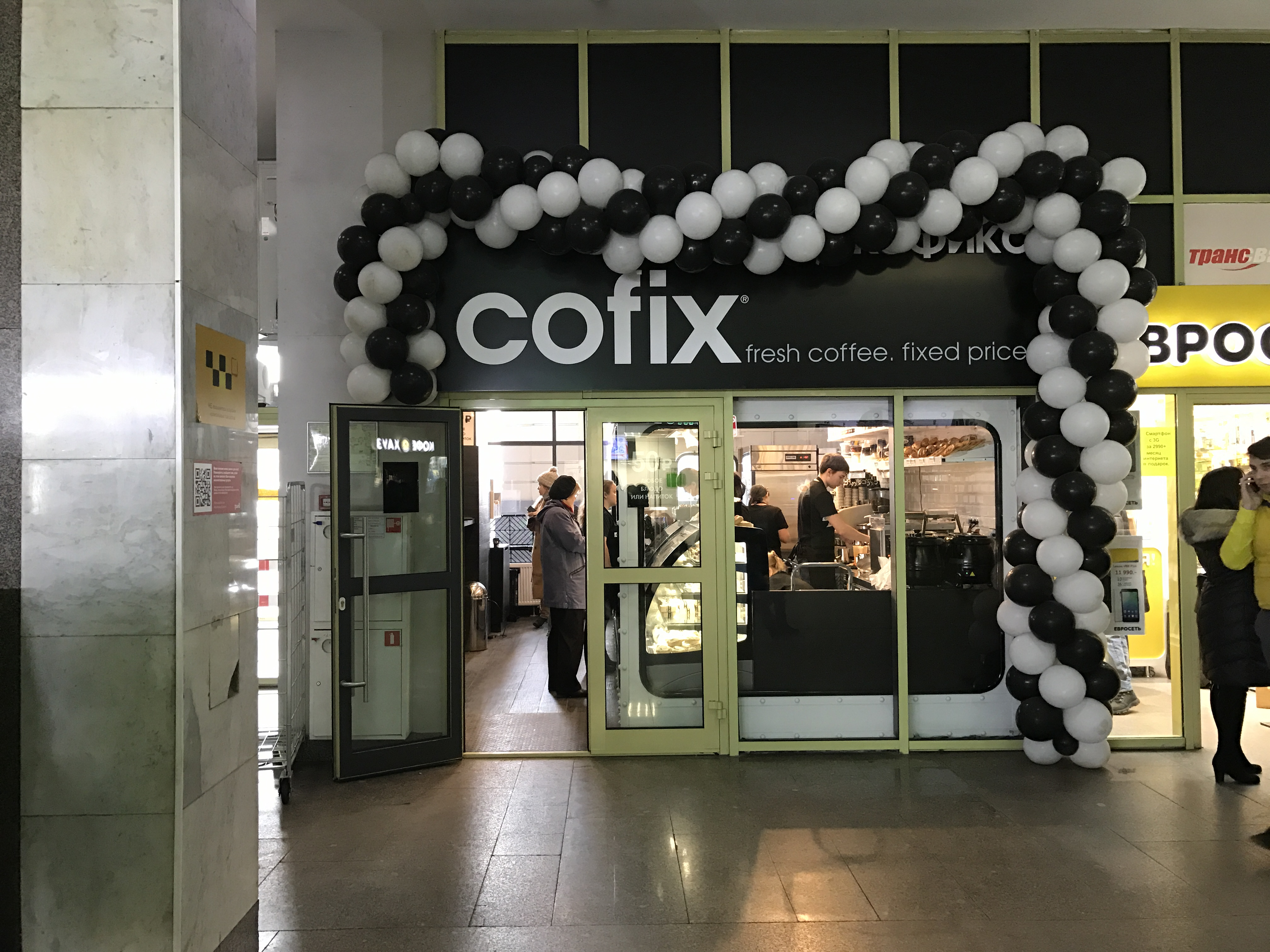 Кафе Cofix в Москве на территории Павелецкого вокзала